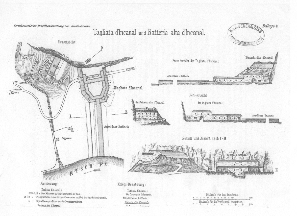 Plan der Straßensperre Incanal im Etschtal (Venetien)